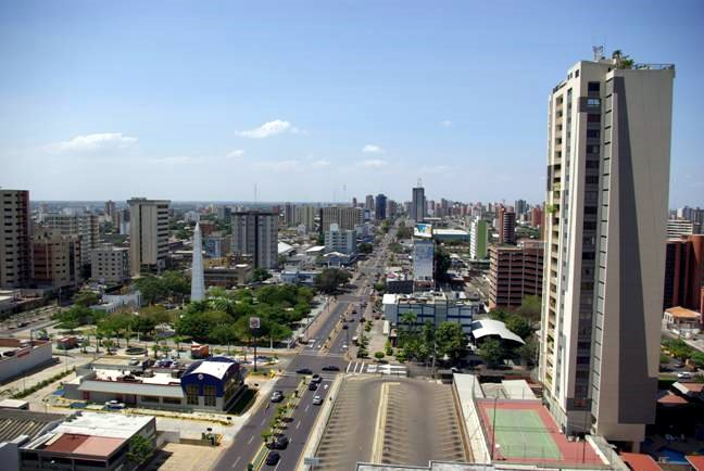 5 de julio, avenue.